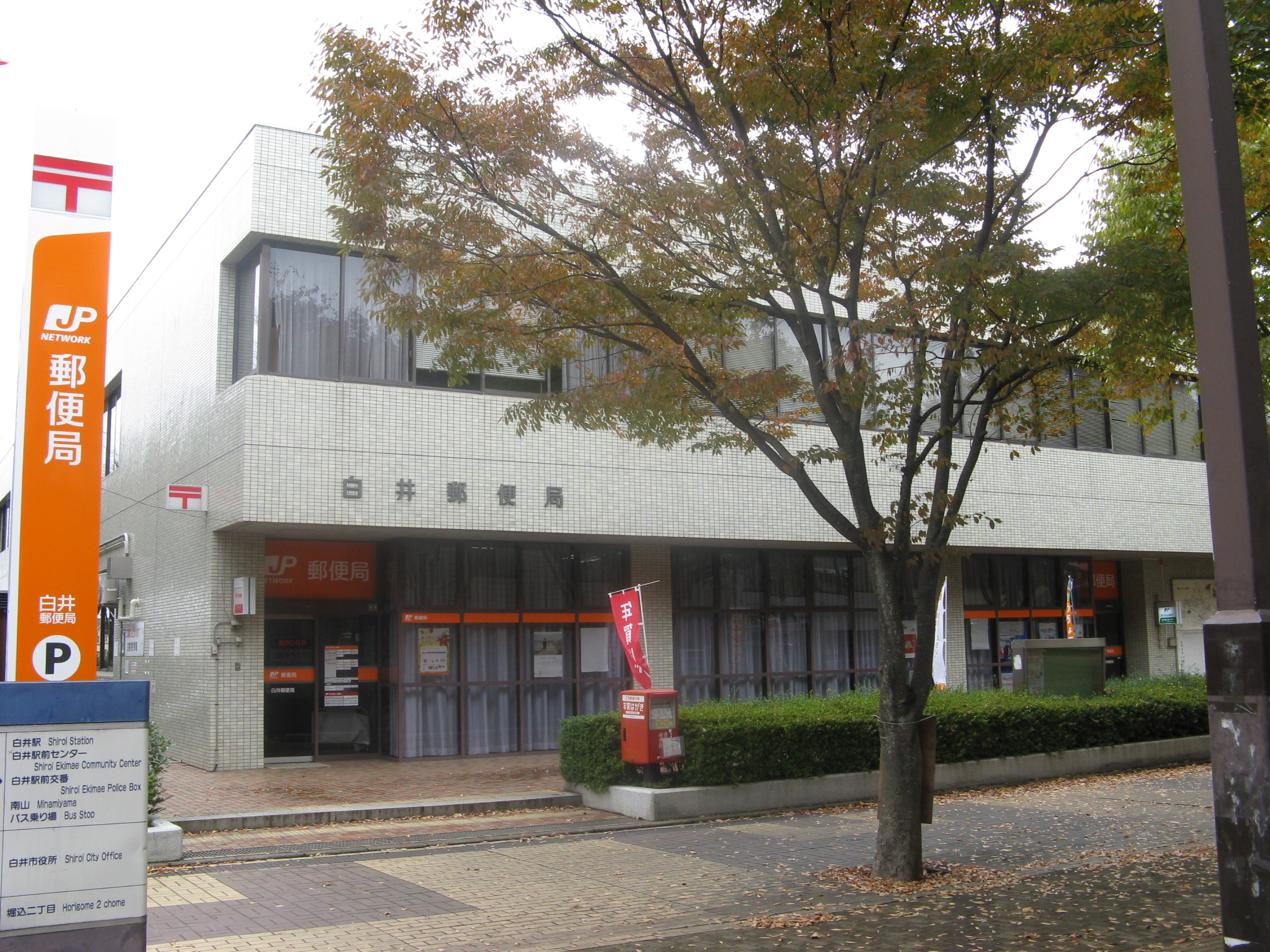 白井郵便局（千葉県白井市）